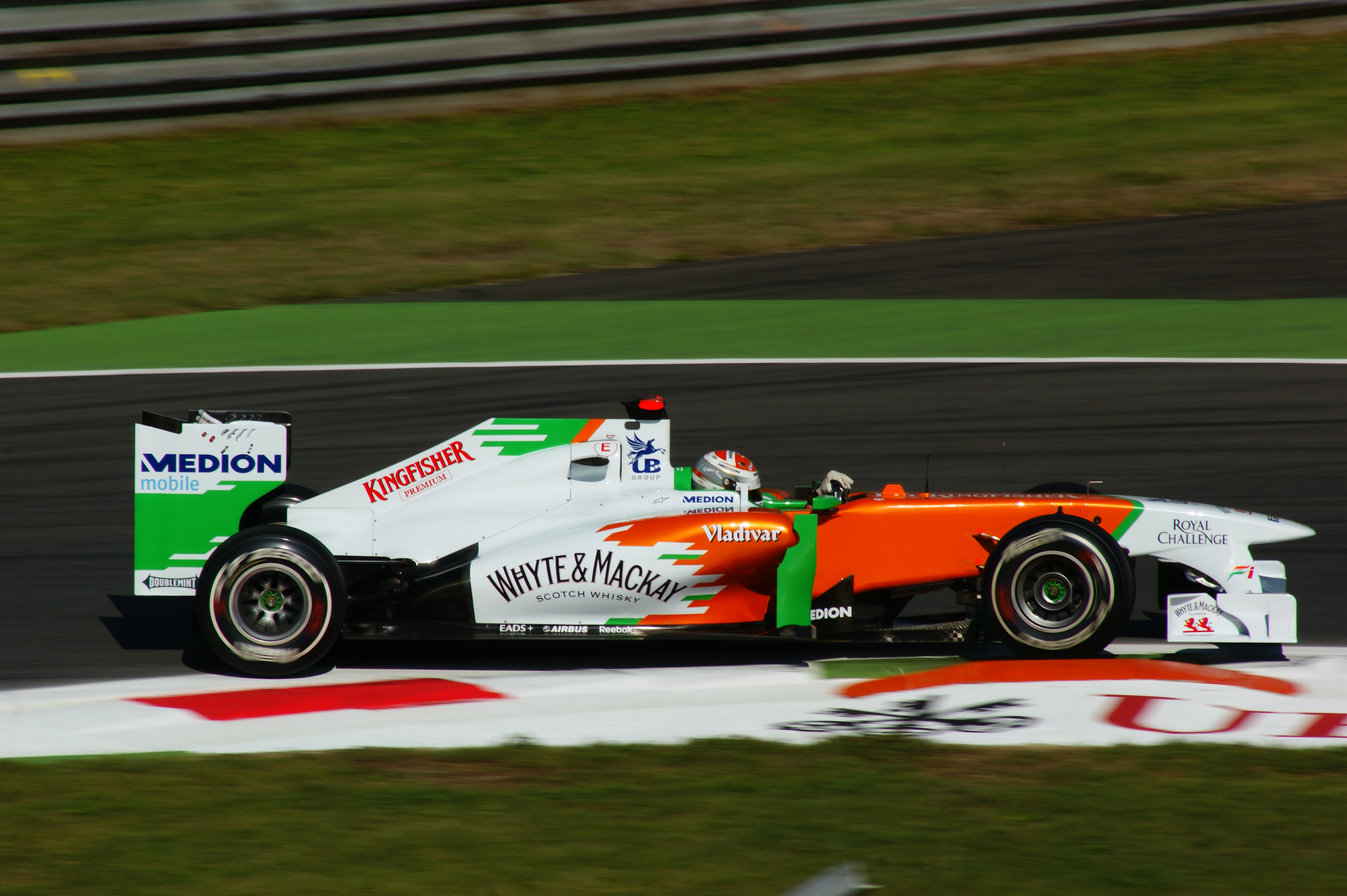 Adrian Sutil alla prima variante Monza 2011